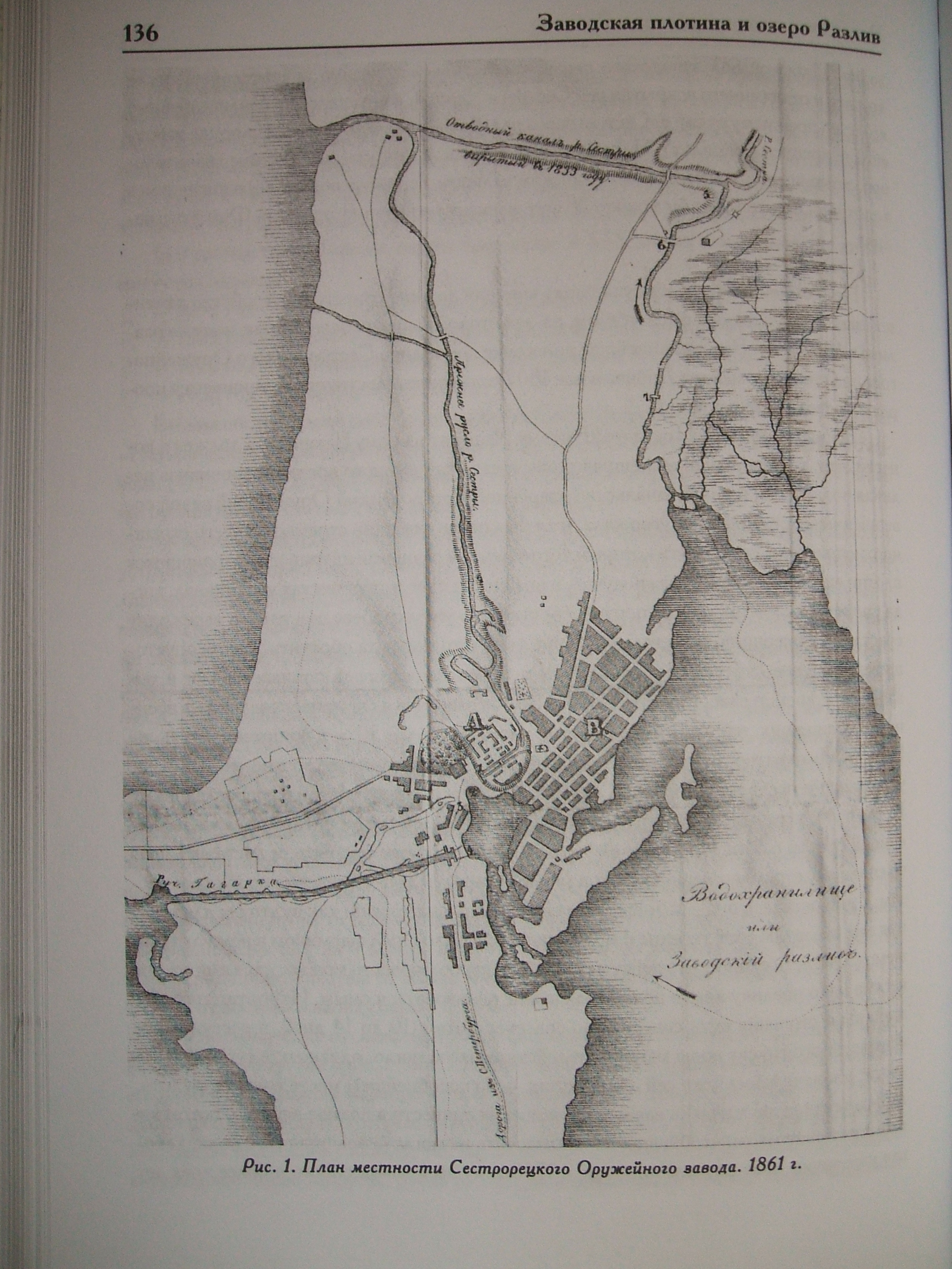 Фото плана Сестрорецкого Разлива на 1861 год